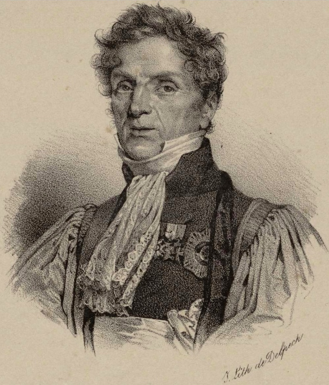 Claude François Chauveau-Lagarde.